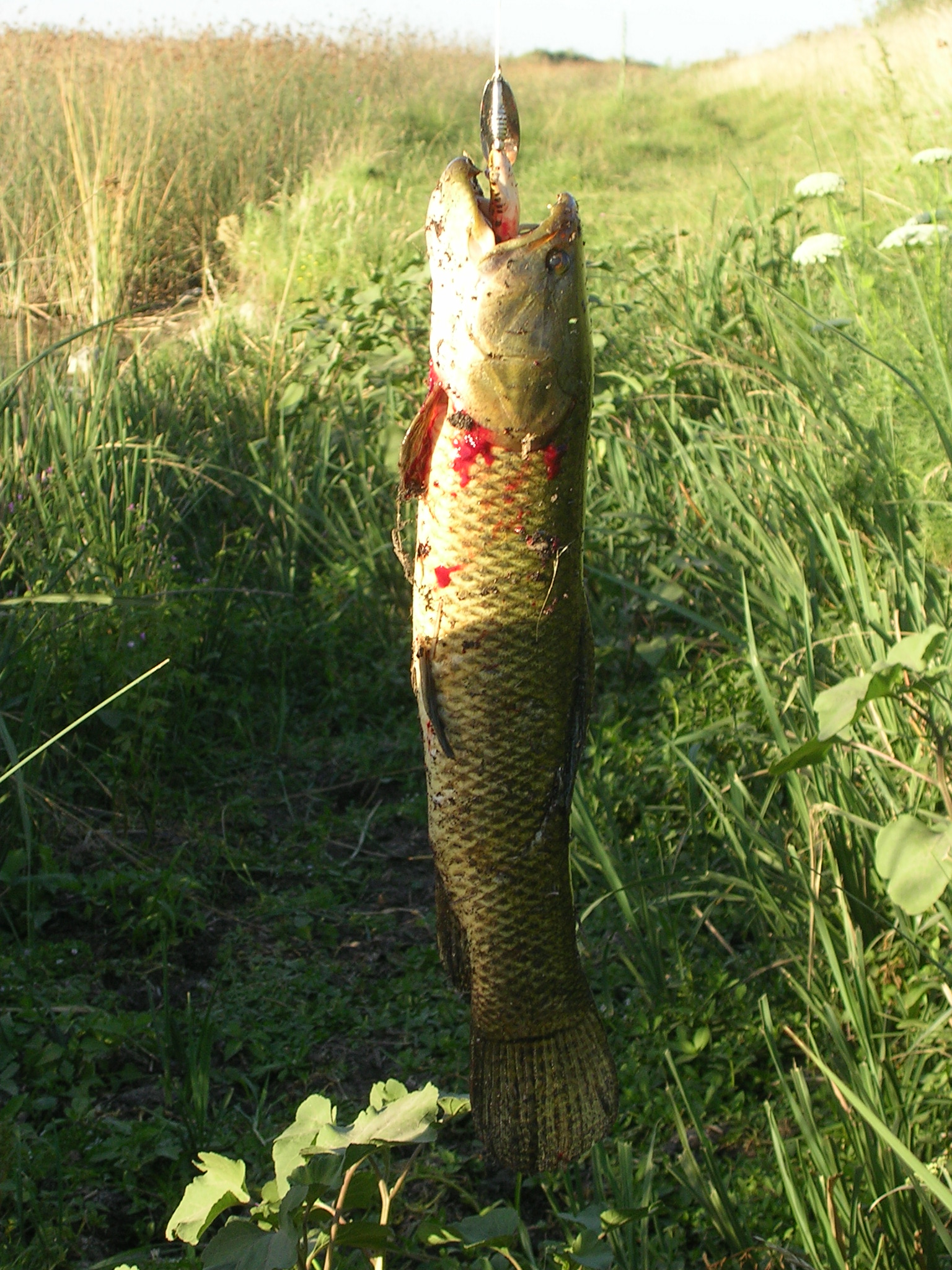 Una tararira pescada en la Laguna Kakel Huicul